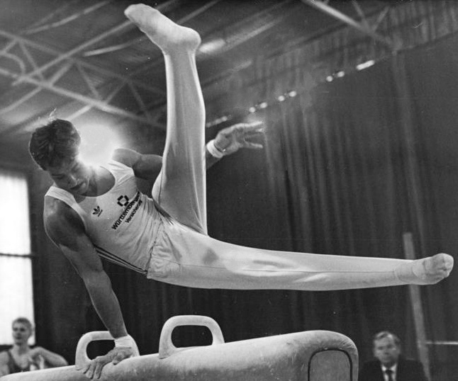 Berlin, Ralph Kern ADN-Bernd Settnik 16.12.90 Berlin: Knüllerwettbewerb Ein Knüllerwettbewerb setzte am Sonntag den Schlußpunkt hinter die dreitägigen Vergleichskämpfe um den Deutschland-Cup der Turner in Berlin. Sieger wurde Ralph Kern (Foto) vom SV Leingarten mit 57,90 Punkten.